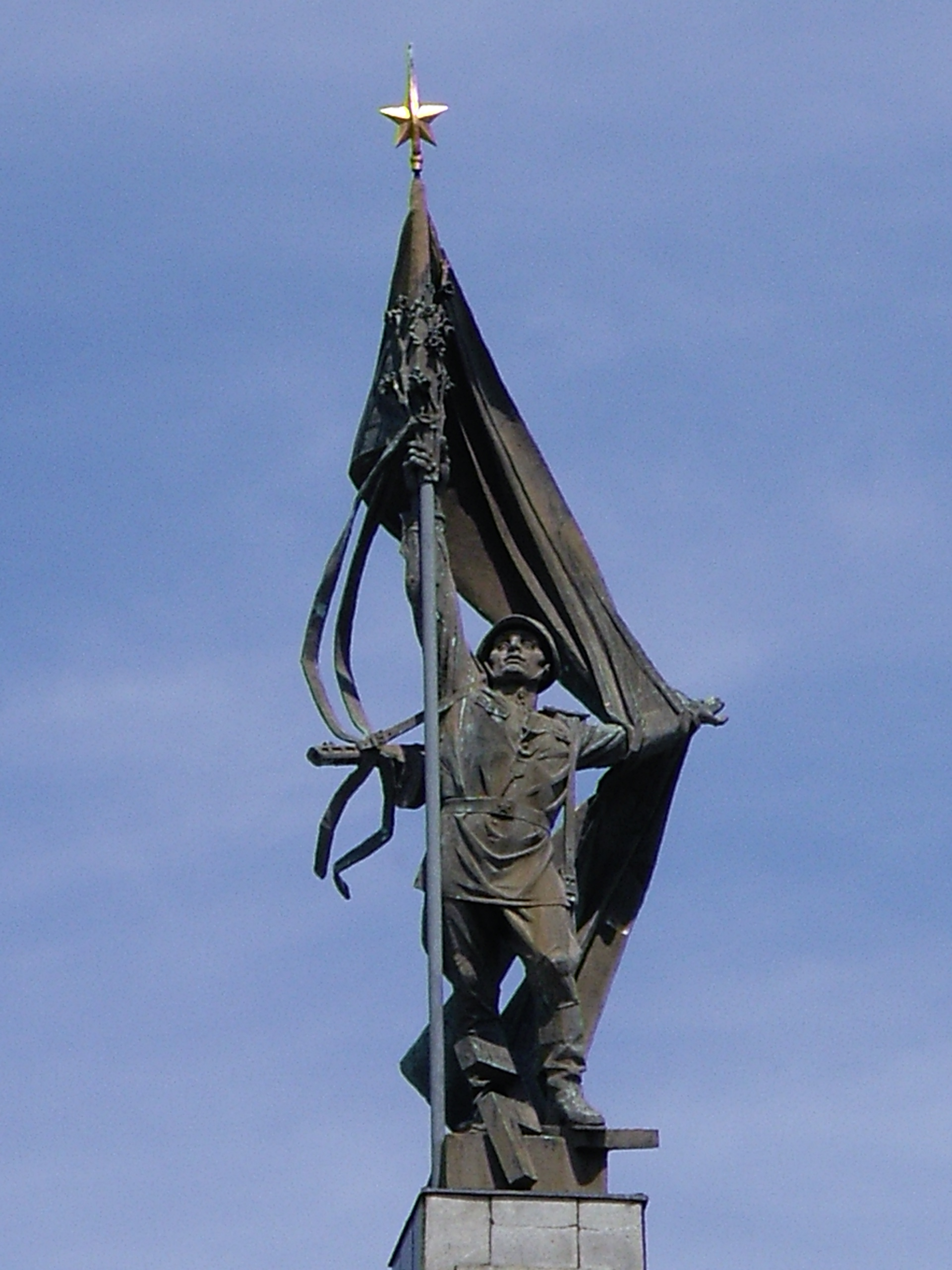 Víťazný vojak na pylóne bratislavského Slavína v Bratislave